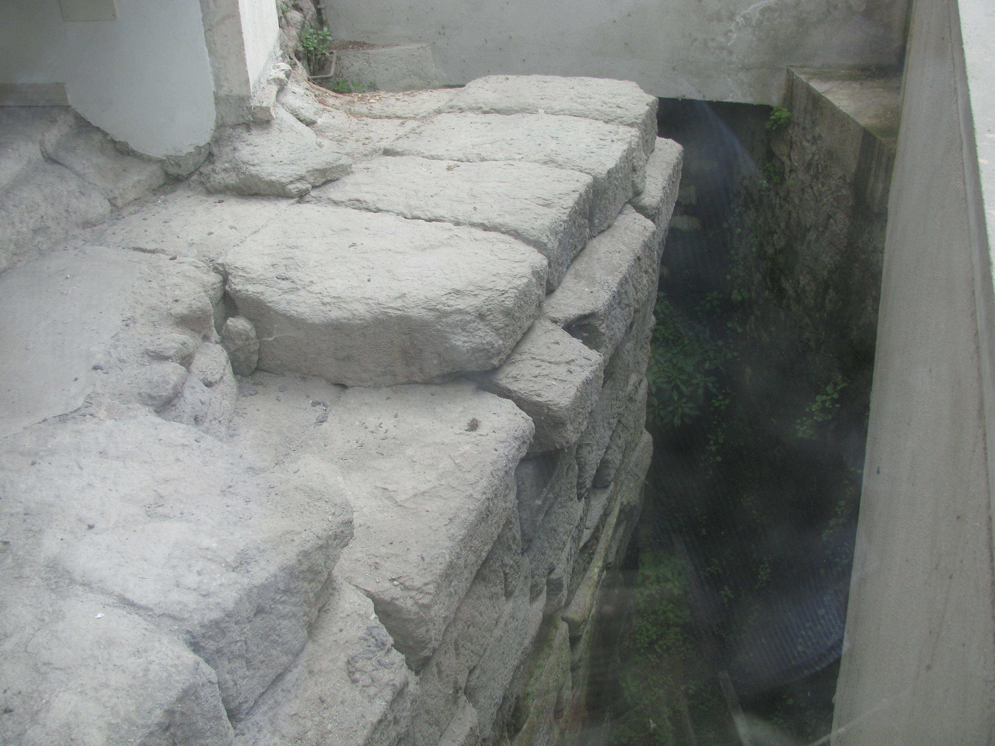 Temple de Jupiter Capitolin. Vestiges des soubassements en cappellaccio, formant l'angle de la façade, visibles dans la via del Tempio di Giove.